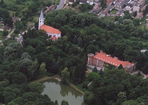 Görcsöny Kisboldogasszony római katolikus templom, Hungary, aerialphotography